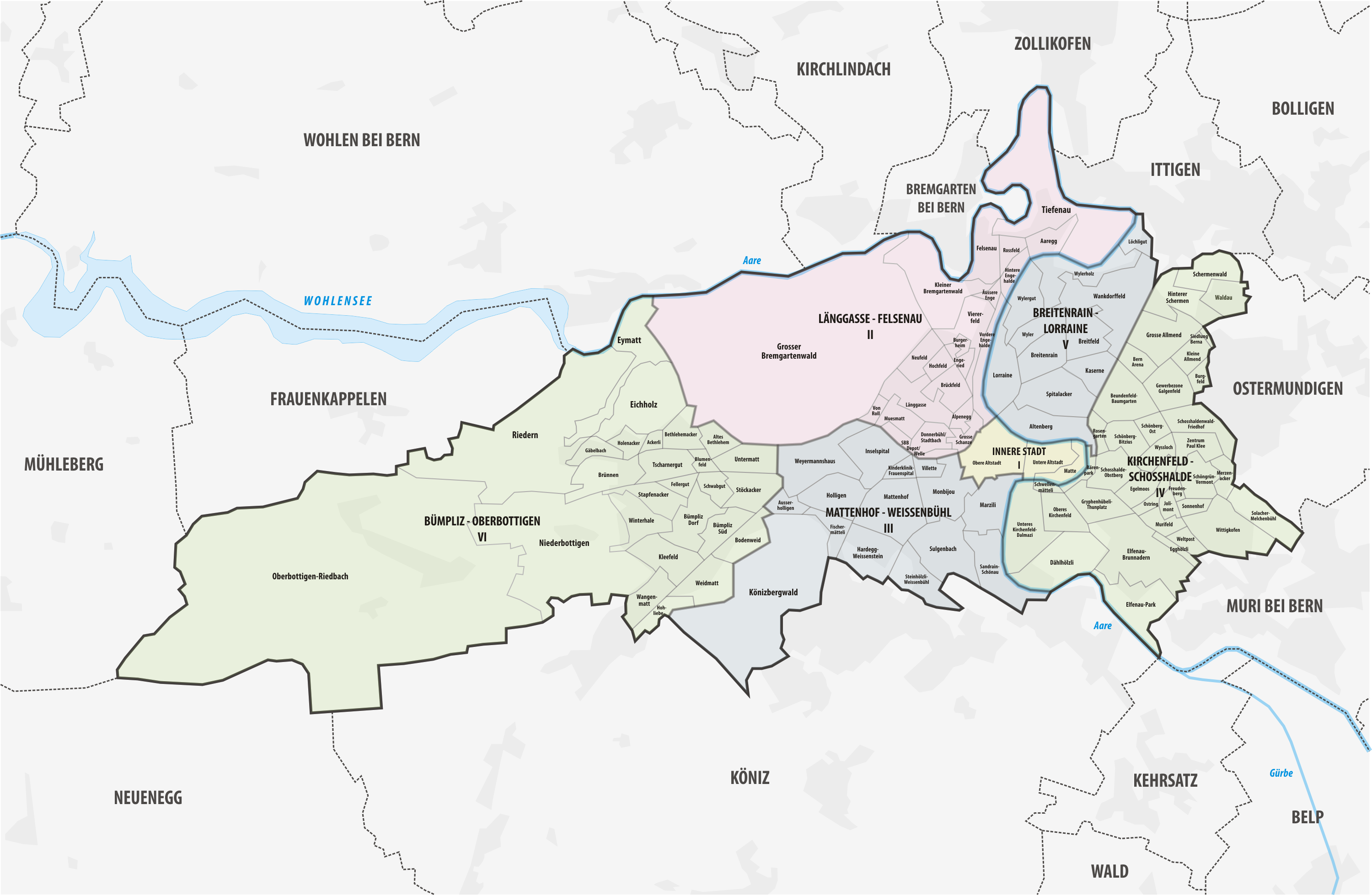 Statistische Quartiere Berns